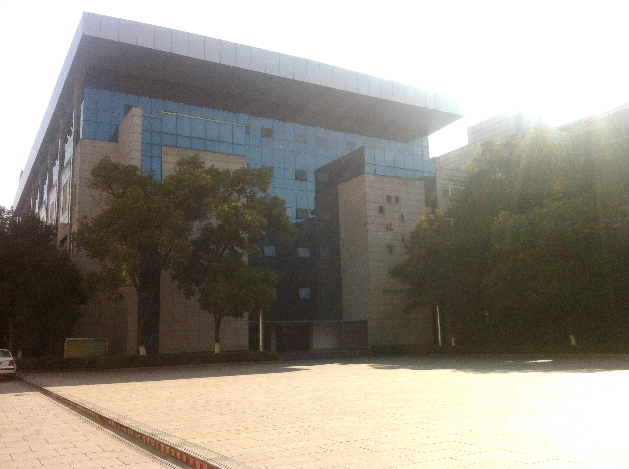 逸夫体育馆的正门，体育馆一层是食堂，二层是乒乓球馆，三层是篮球馆，除却这些功能区外，还有一部分用作教师办公室和学生宿舍。